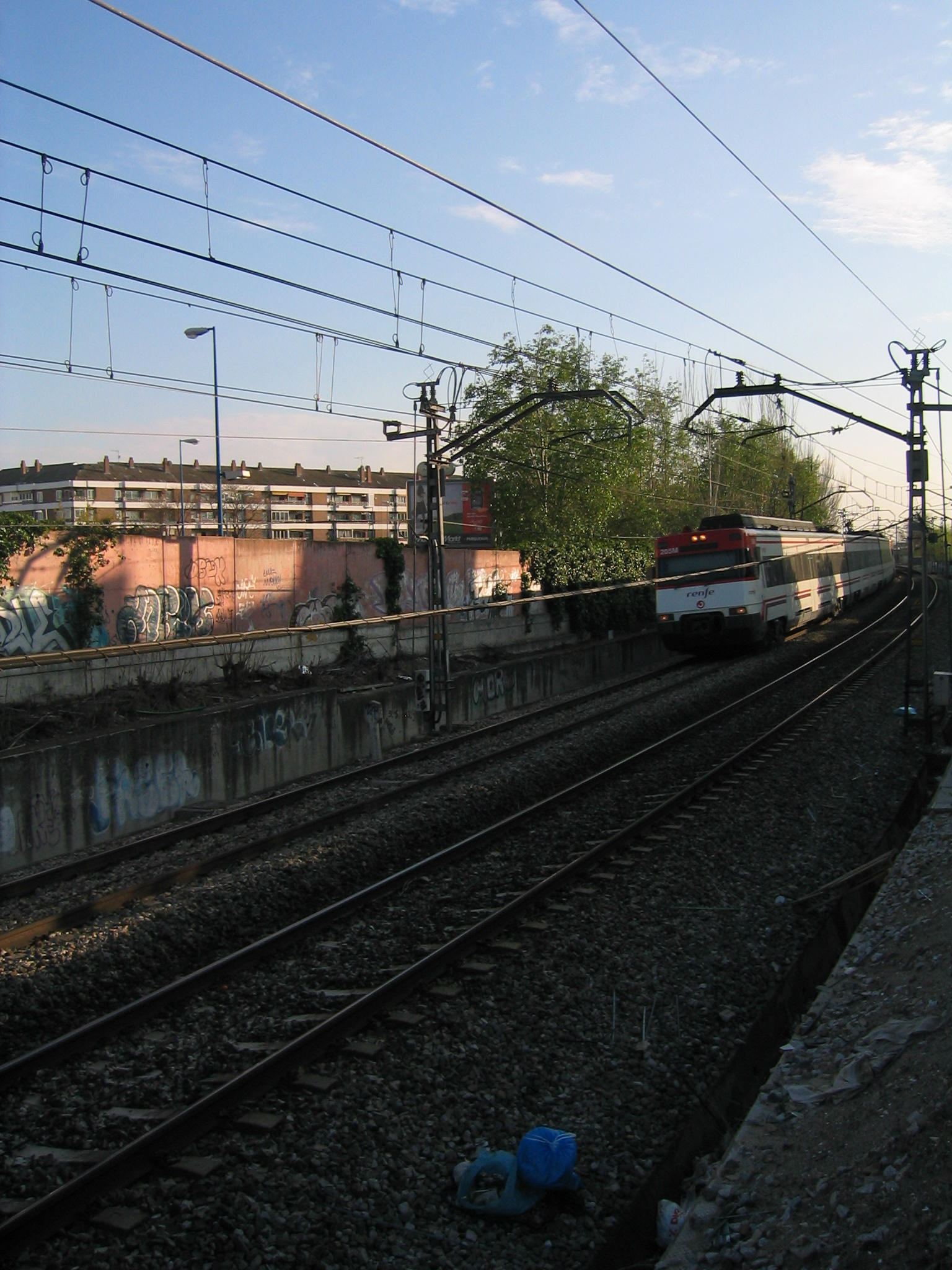 Vista de un tramo de la línea ferroviaria de cercanías C-5 a su paso por San Nicasio, en el municipio de Leganés (Madrid, España).